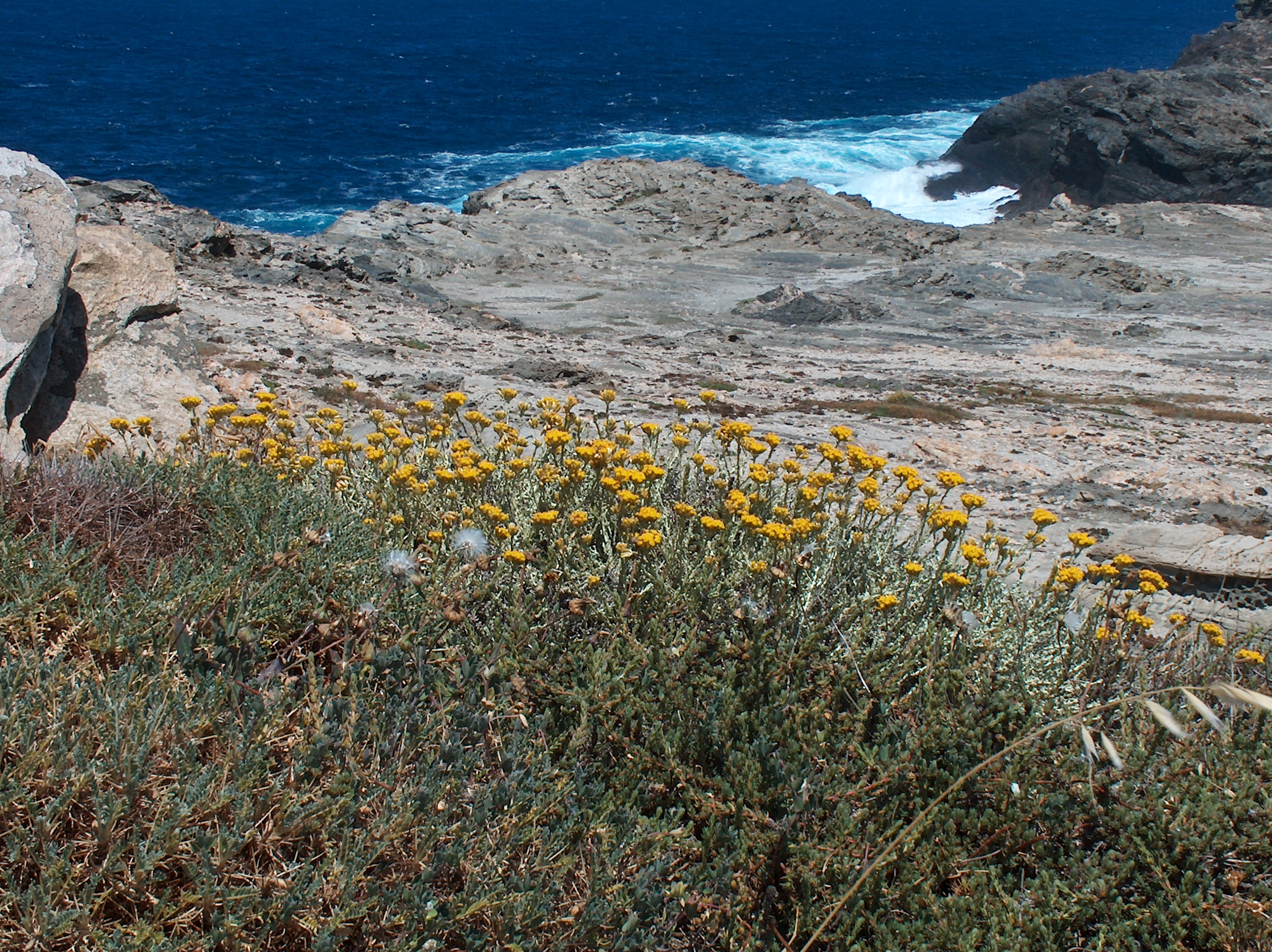 Helichrysum